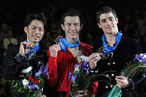 Подиум в мужском одиночном катании в финале Гран-при по фигурному катанию сезона 2011-2012. Слева на право: Дайскэ Такахаси (2-е место), Патрик Чан (1 место), Хавьер Фернандес (3-е место)